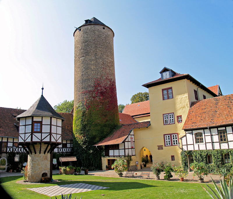 Der Burghof mit Blick auf das Kastell